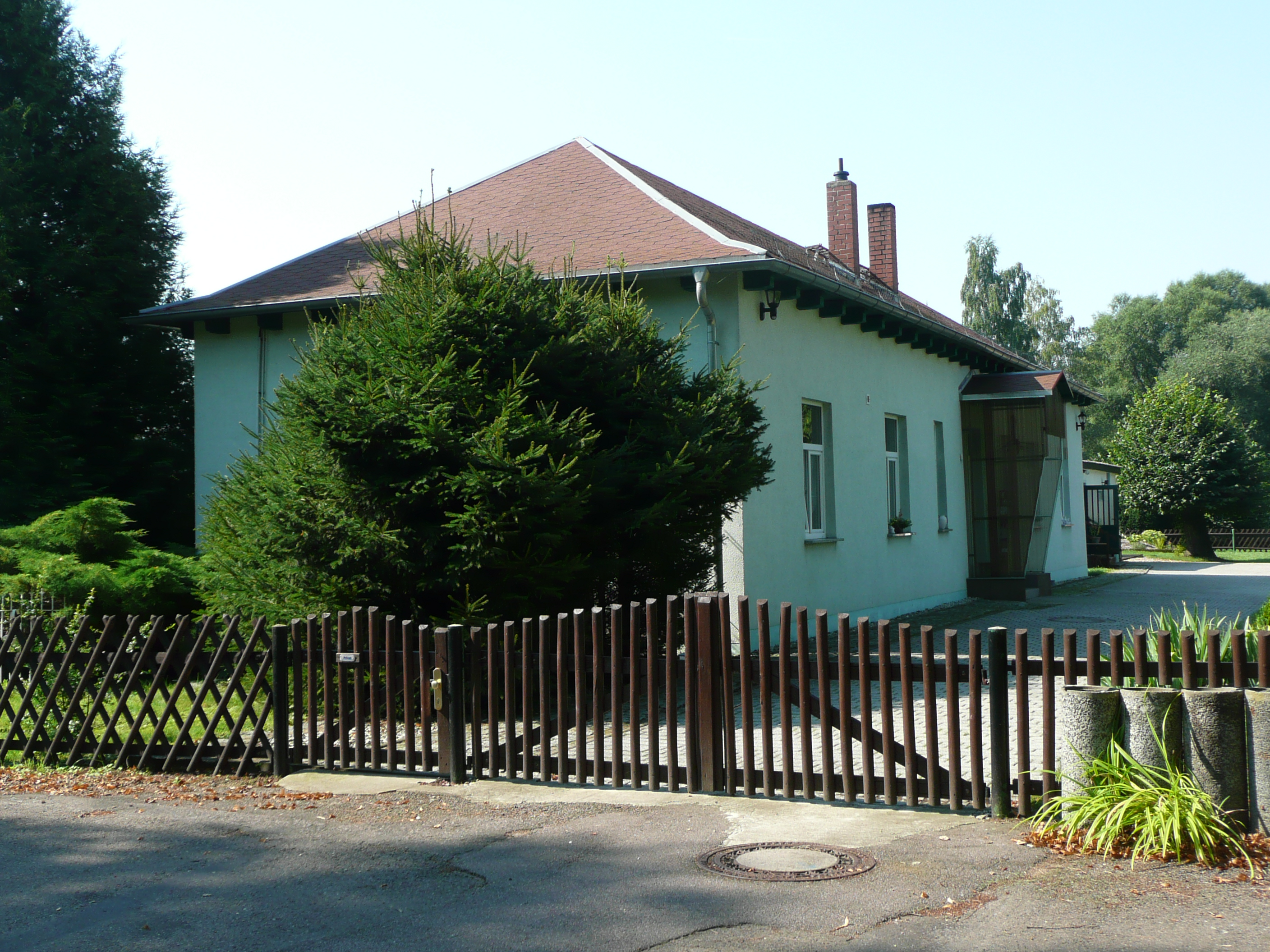 Zum Wohnhaus umfunktioniertes ehemaliges Empfangsgebäude des Bahnhof Gärtitz